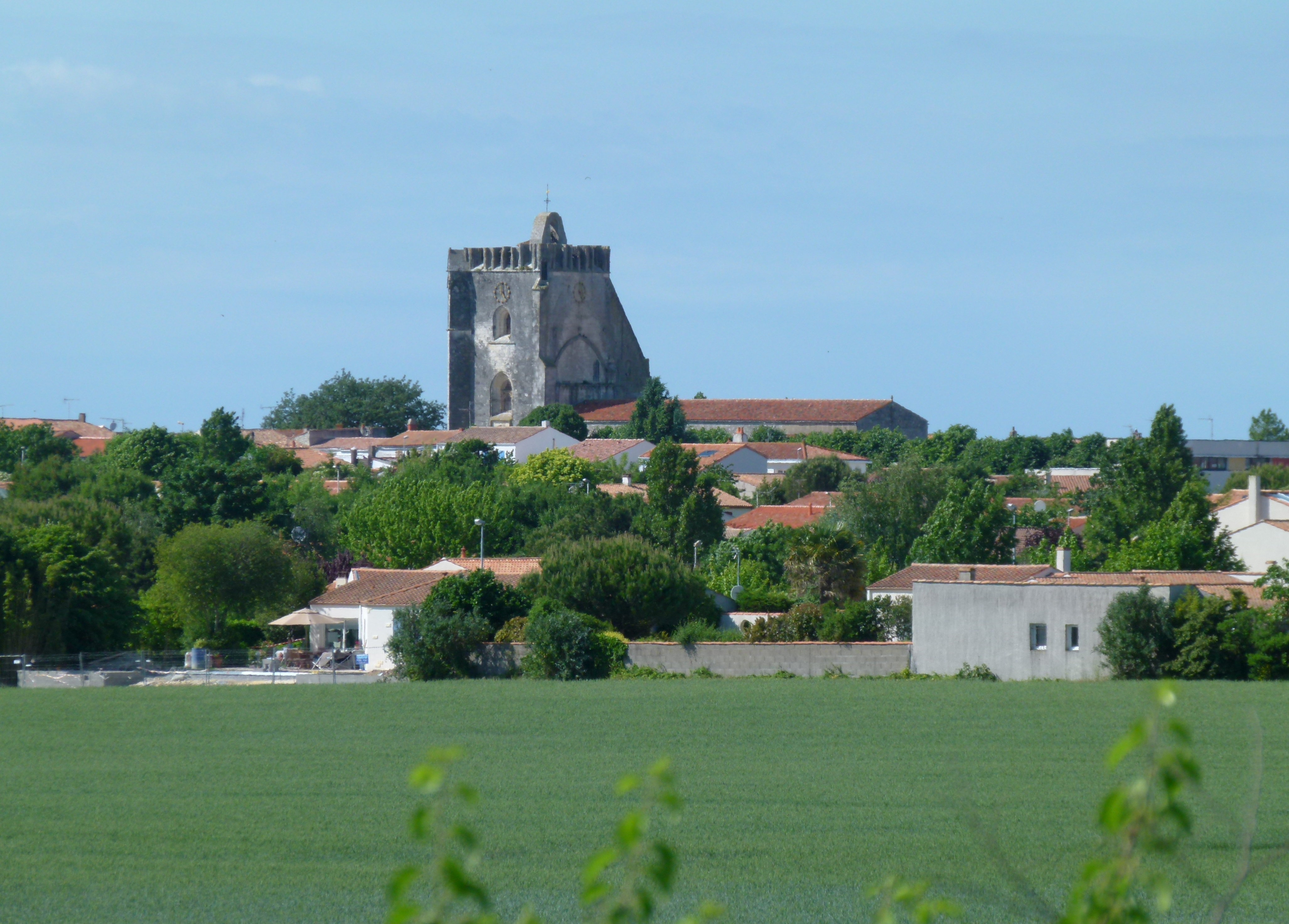 Le clocher de l'église de Marsilly (17) vu depuis le rond-point de la barque.